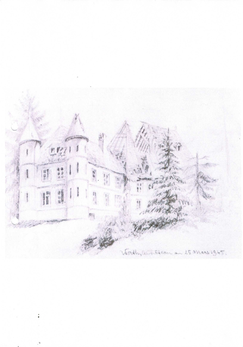 le chateau de werde le 25 mars 1945